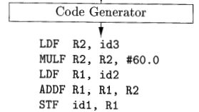 ֆզֆբ